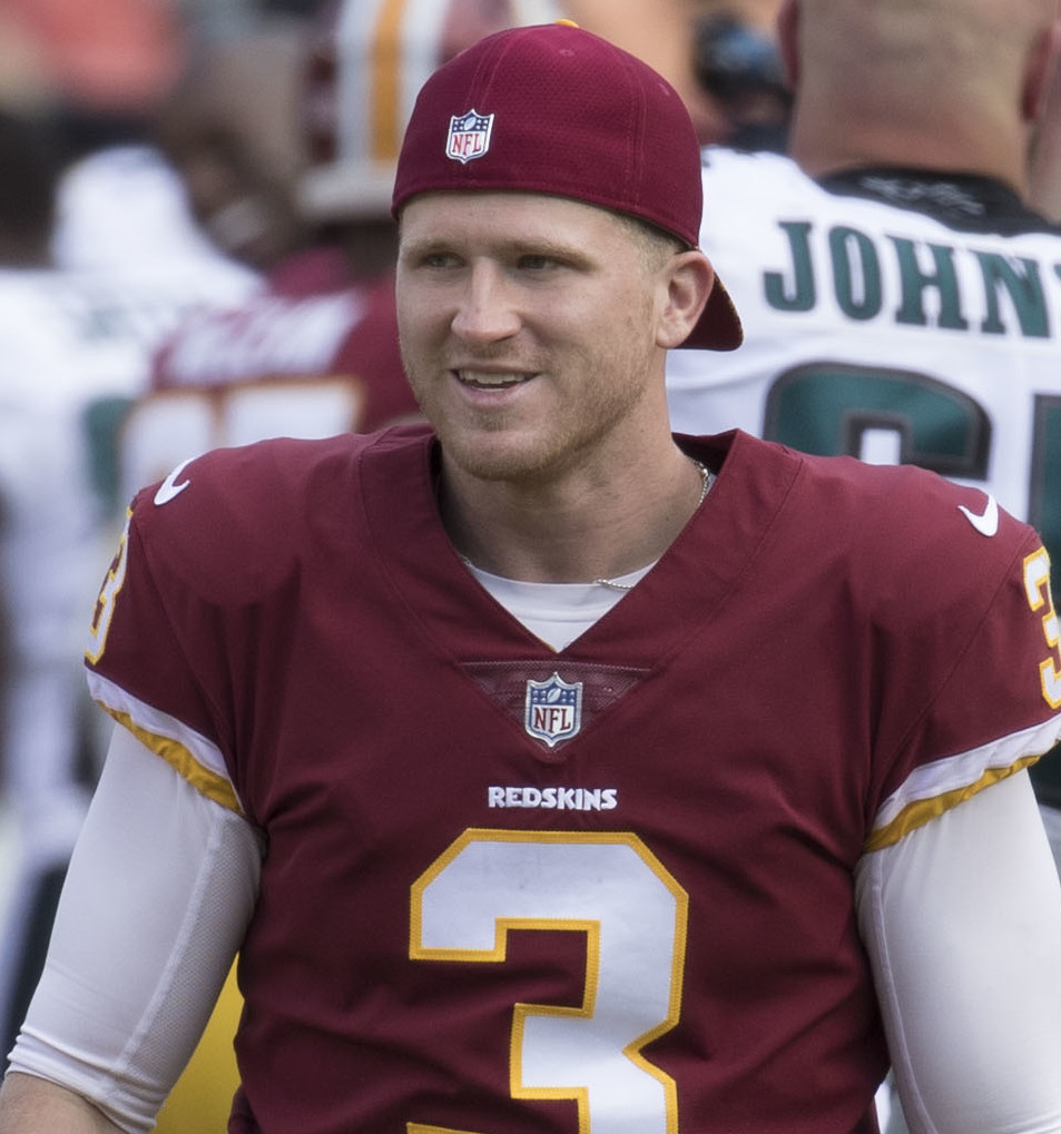 Eagles at Redskins 9/10/17